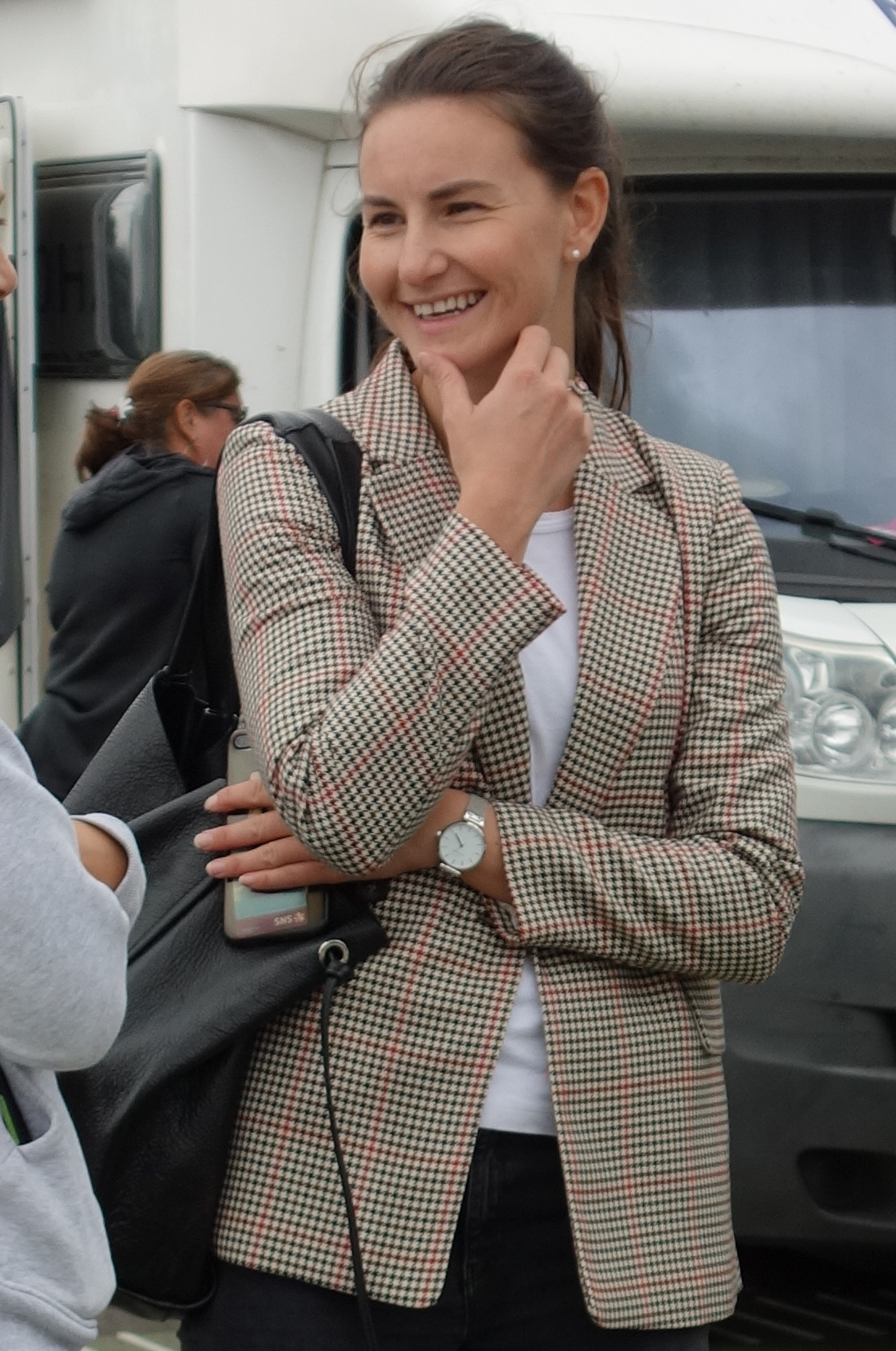 Esra Tromp (manager Parkhotel Valkenburg) bij de proloog op het Tom Dumoulin Bike Park in Sittard in de Boels Ladies Tour 2019